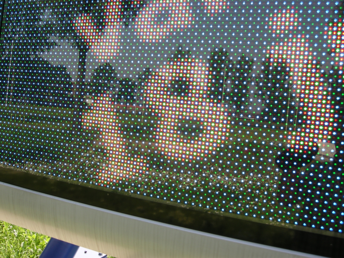 Een deelopname van een ledbeeldscherm